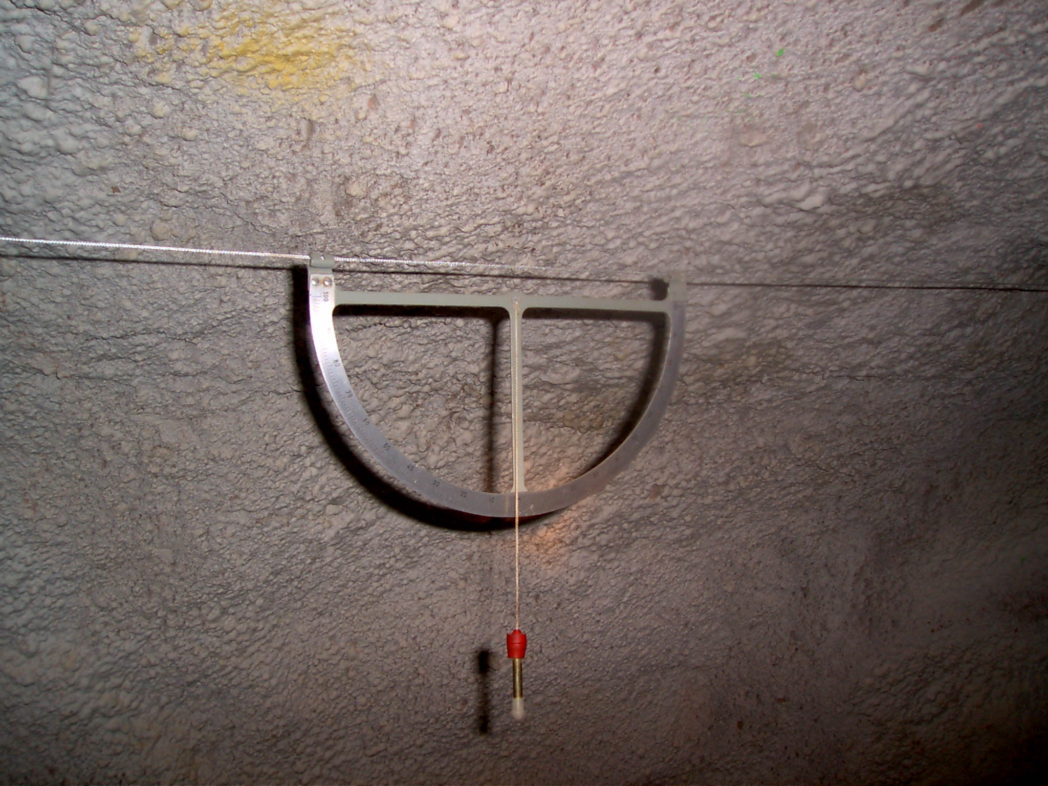 Gradbogen mit 100-Gon-Teilung.